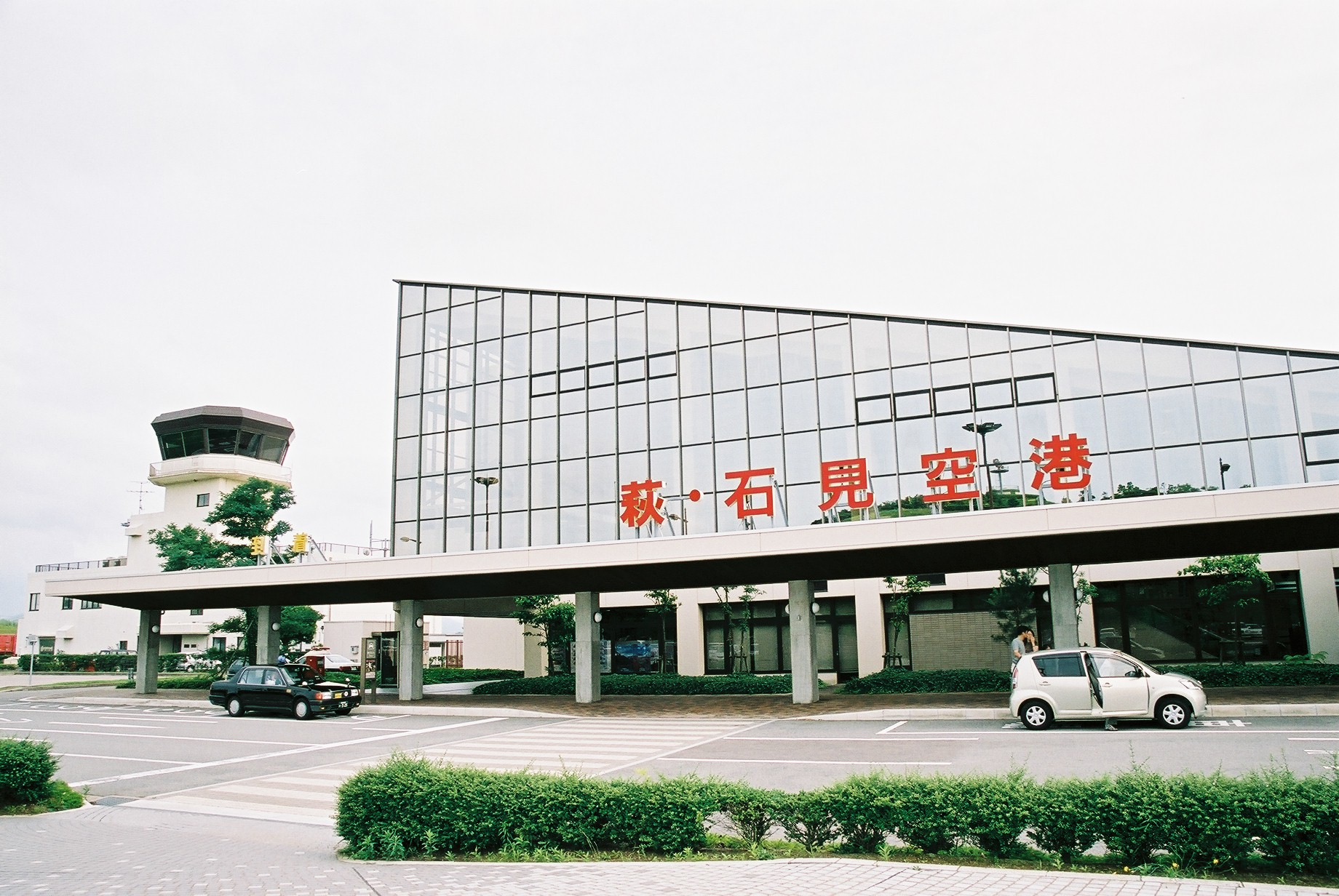 萩・石見空港。 (2006/07/02 Hagi-Iwami Airport, Masuda, Shimane, JAPAN)